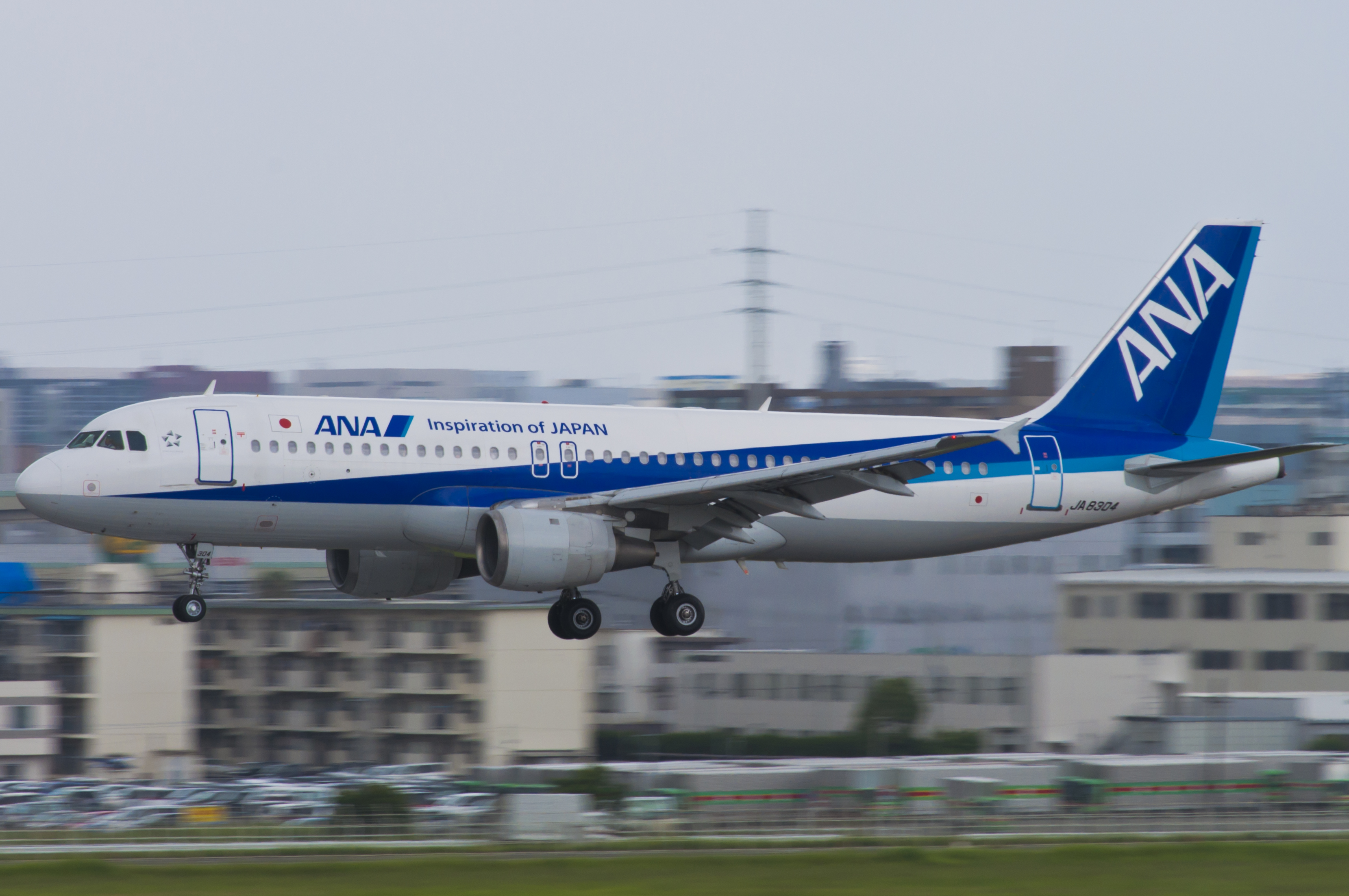 ANAのA320。Inspiration of Japanタグラインが塗装された機体。